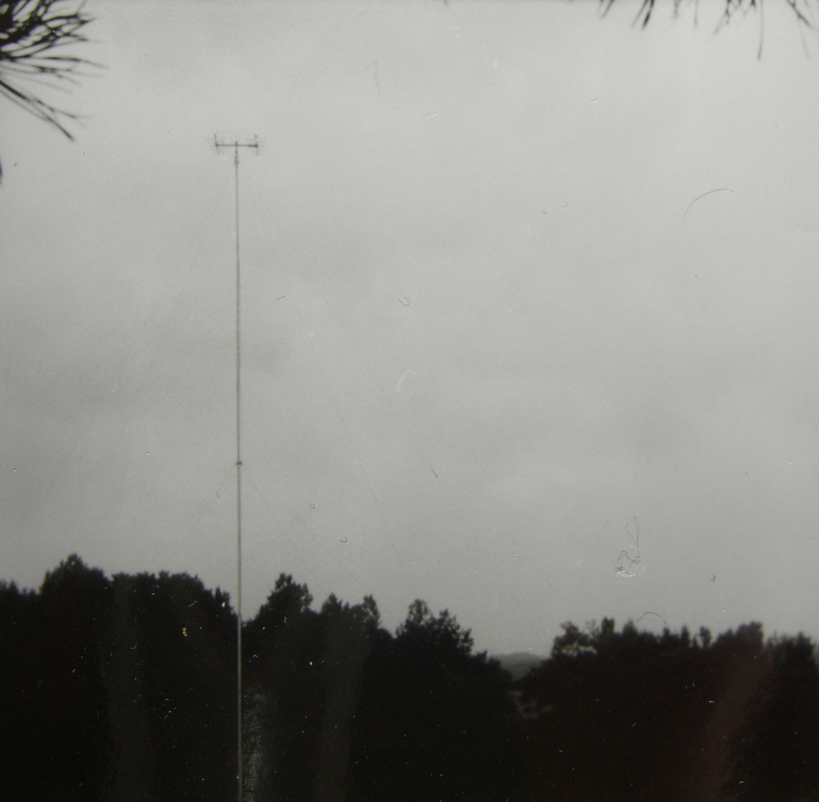 RT415 Antenne